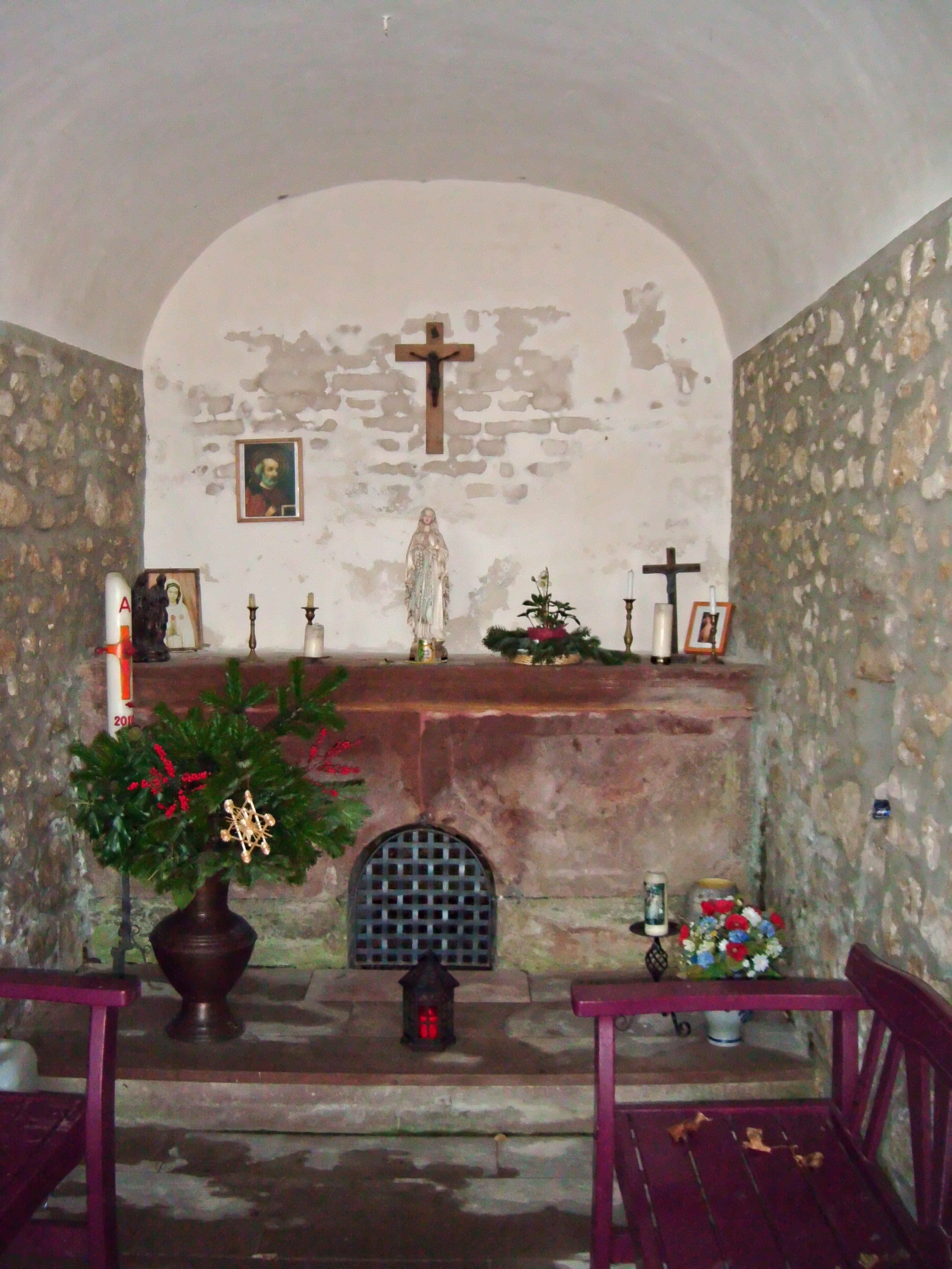 Bockenheim an der Weinstraße, Heiligenkirche (St. Peter), Innenraum mit Altar und Quelle